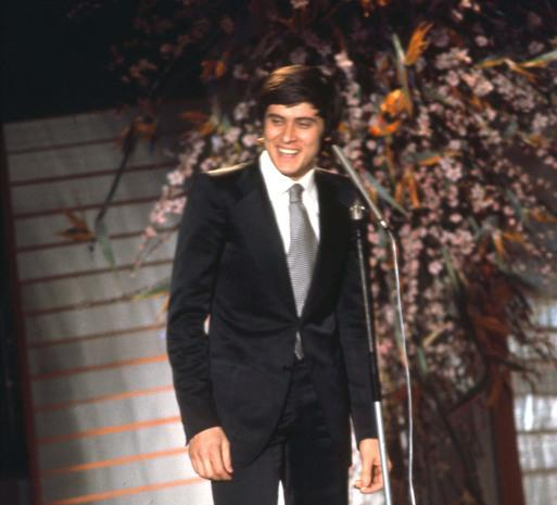 Gianni Morandi al Festival di Sanremo 1972